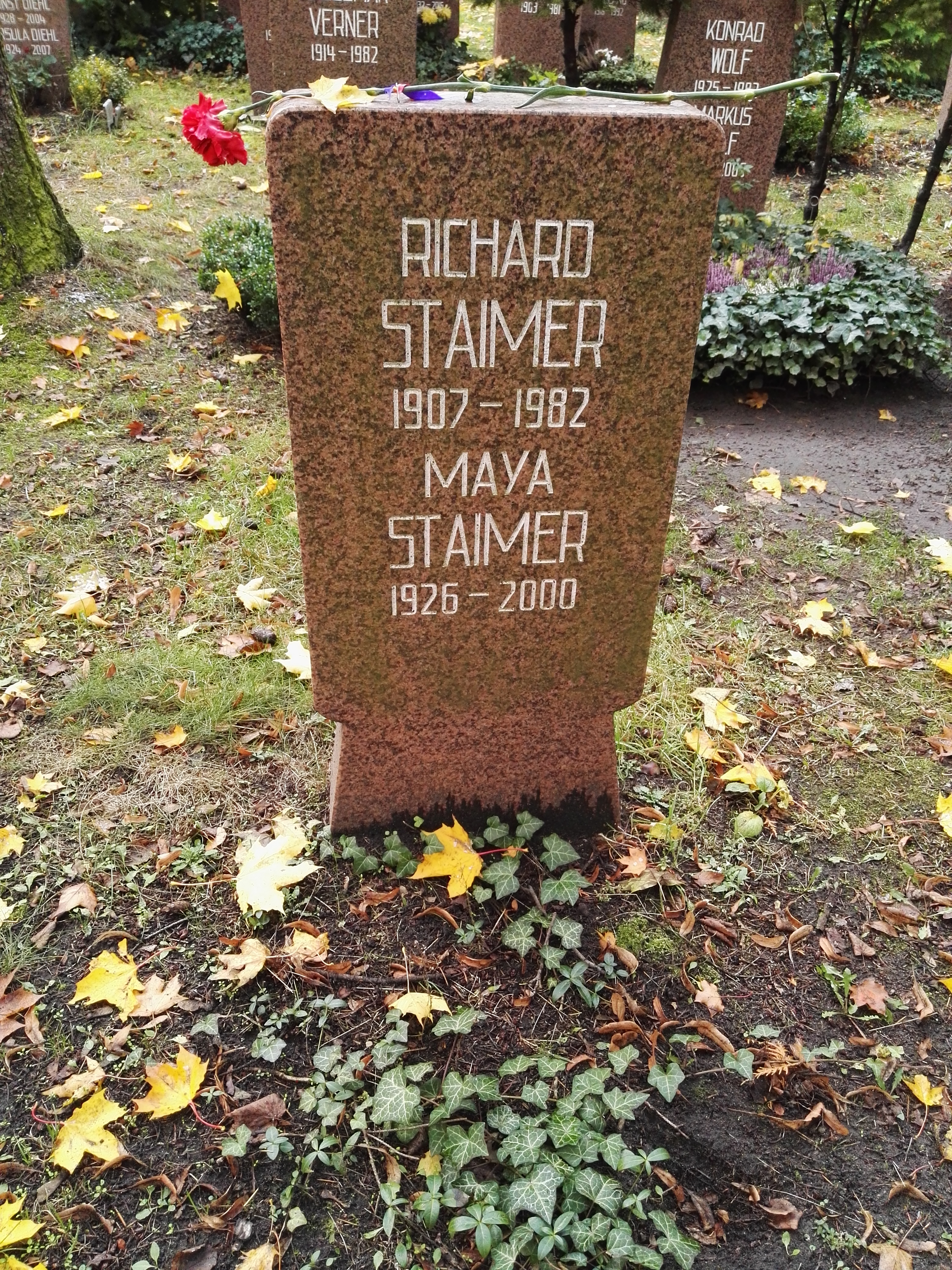 Grab von Richard Staimer und Maya Staimer auf dem Sozialistenfriedhof des Zentralfriedhofs Friedrichsfelde